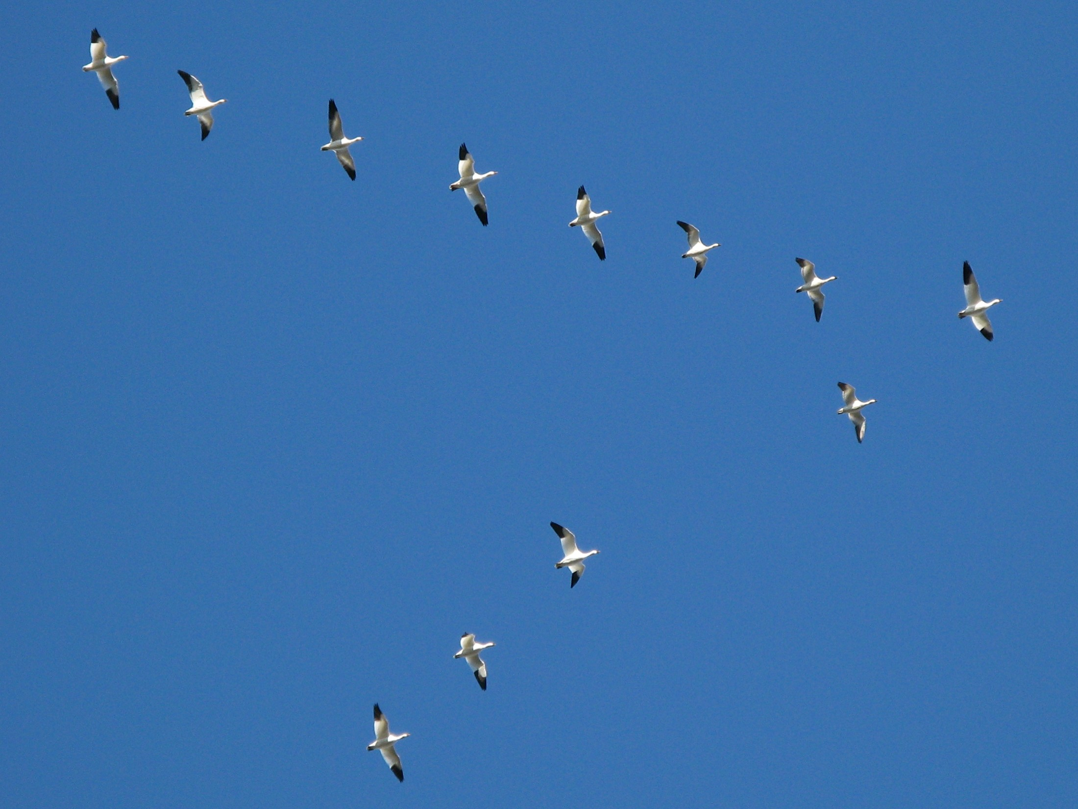 Grandes oies des neiges -- Greater snow geese Chen caerulescens atlanticus Bas-Saint-Laurent -- Province de Québec -- Canada Prise en octobre 2008 -- Taken in October 2008